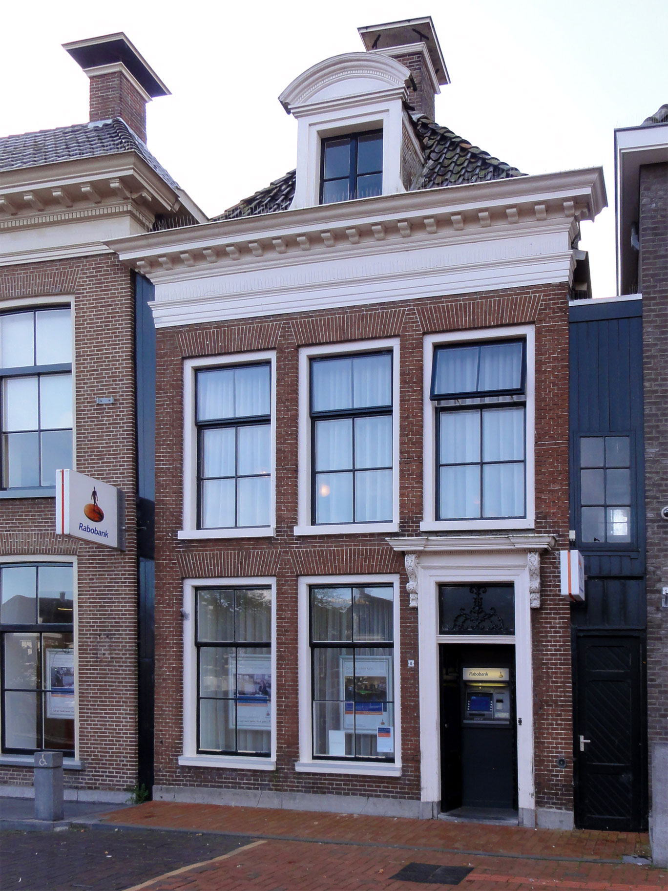 De Dijk 8 Dokkum. rijksmonument